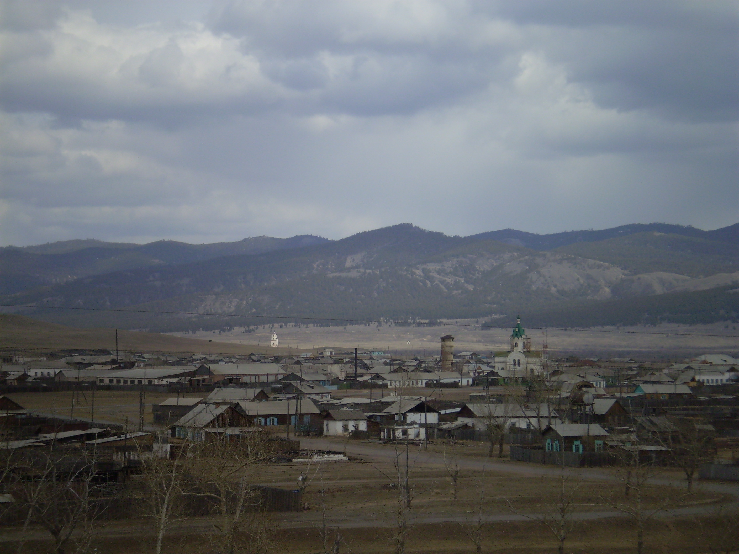 Новоселенгинск